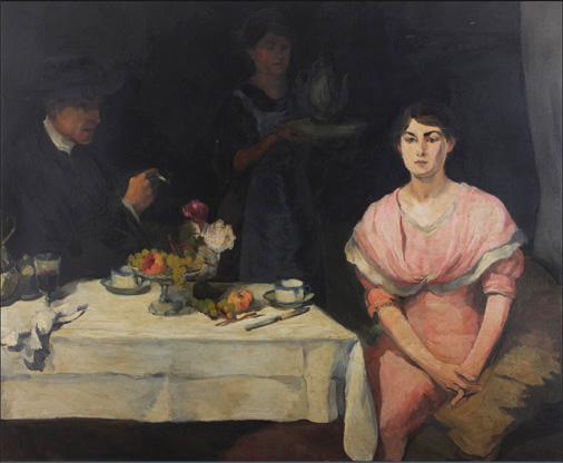 Manuel Jardim, Le dejeuner, 1911, óleo sobre tela, 142,8 x 175,5 cm, Museu Nacional de Machado de Castro, Coimbra